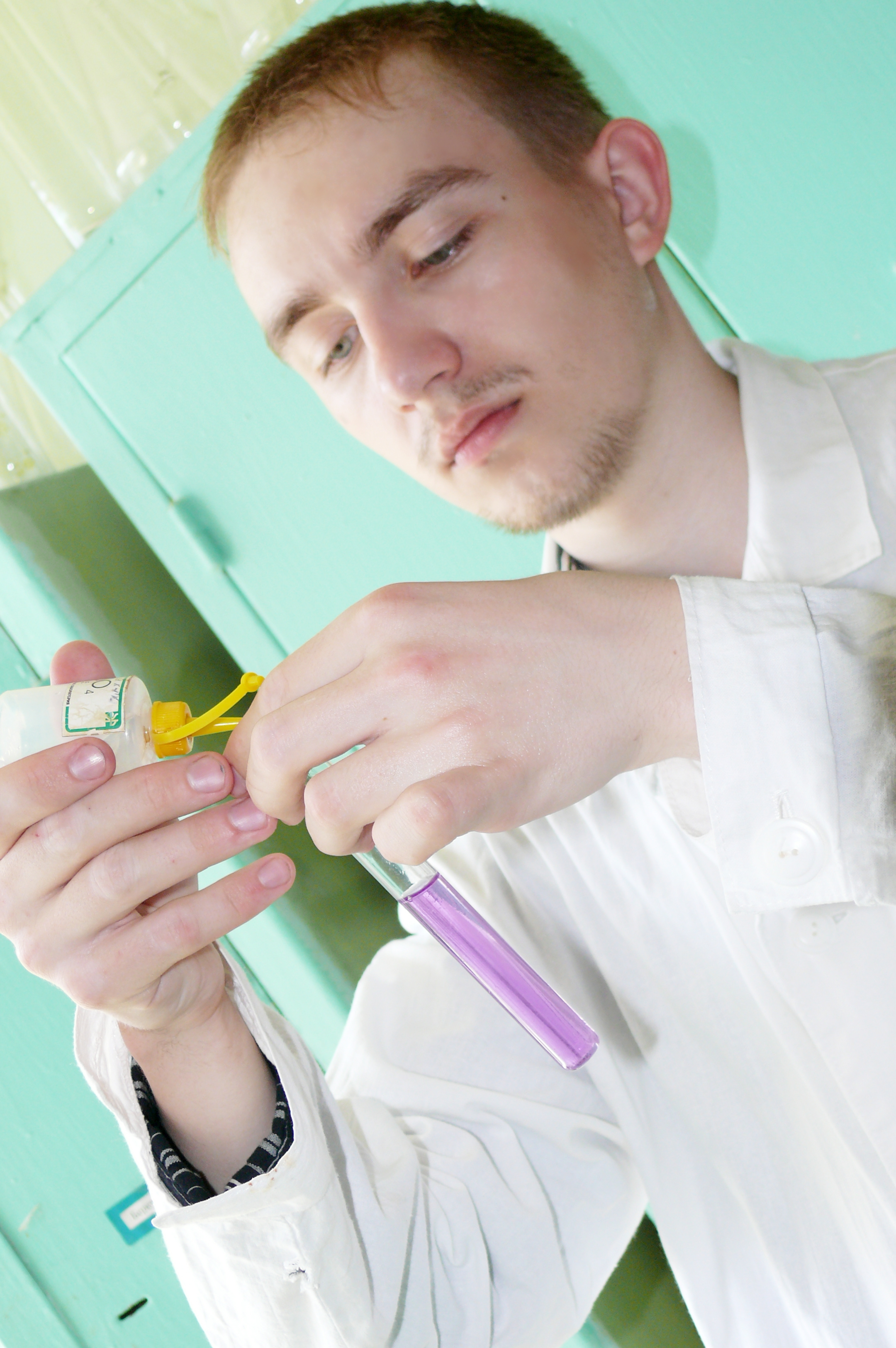 Качественная реакция фуксинсернистой кислоты в кислой среде с раствором формальдегида. Фото лаборатории Drago laboratory